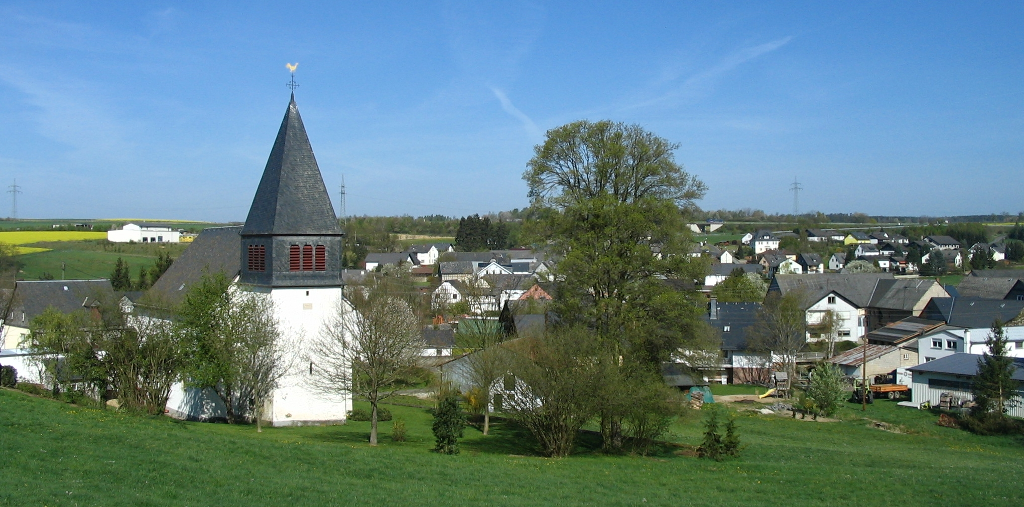 Ohlweiler in the Hunsrück Area